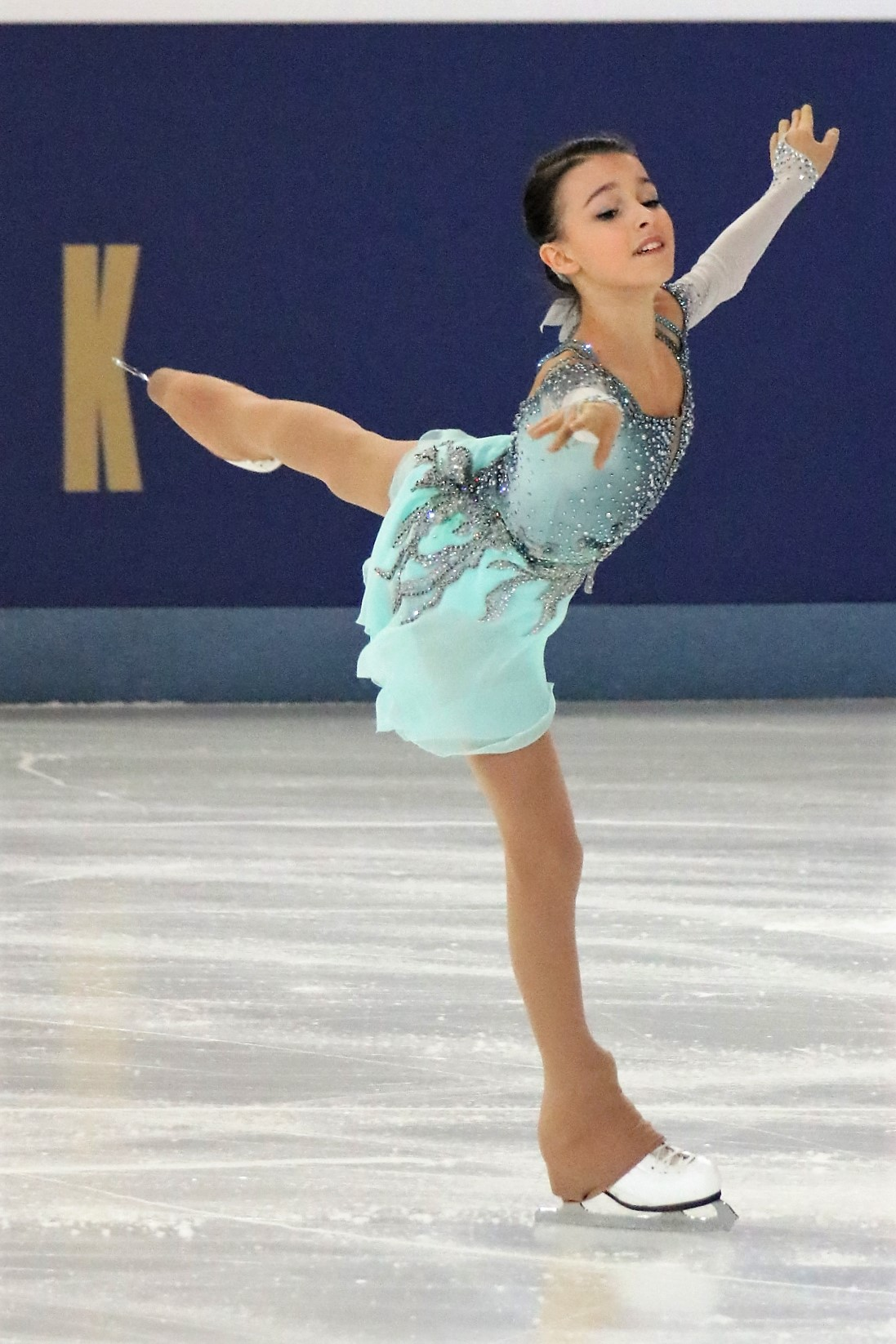 Анна Щербакова на чемпионате России по фигурному катанию на коньках 2019